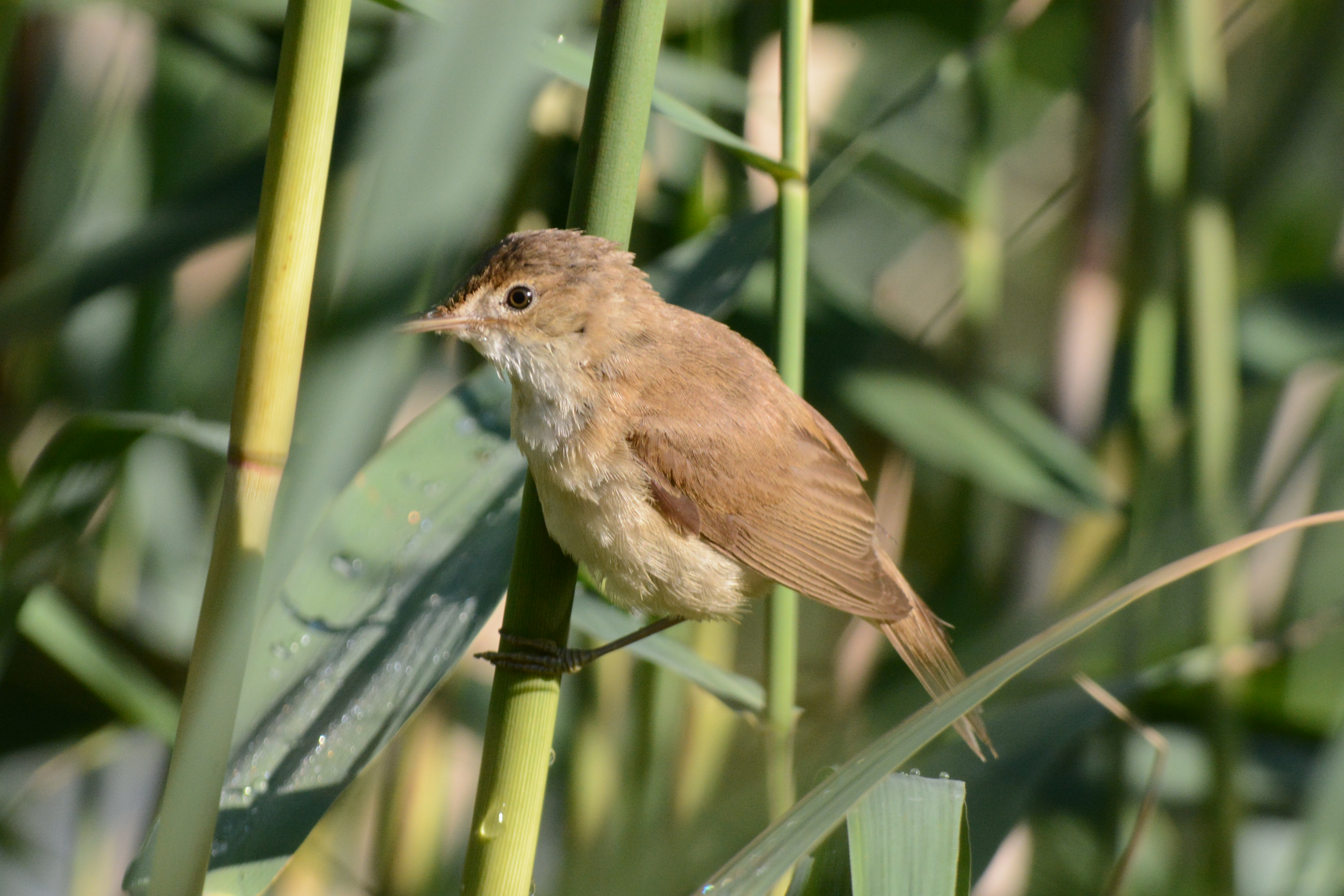 Biotopo Lago d'Idro (Q47510348)